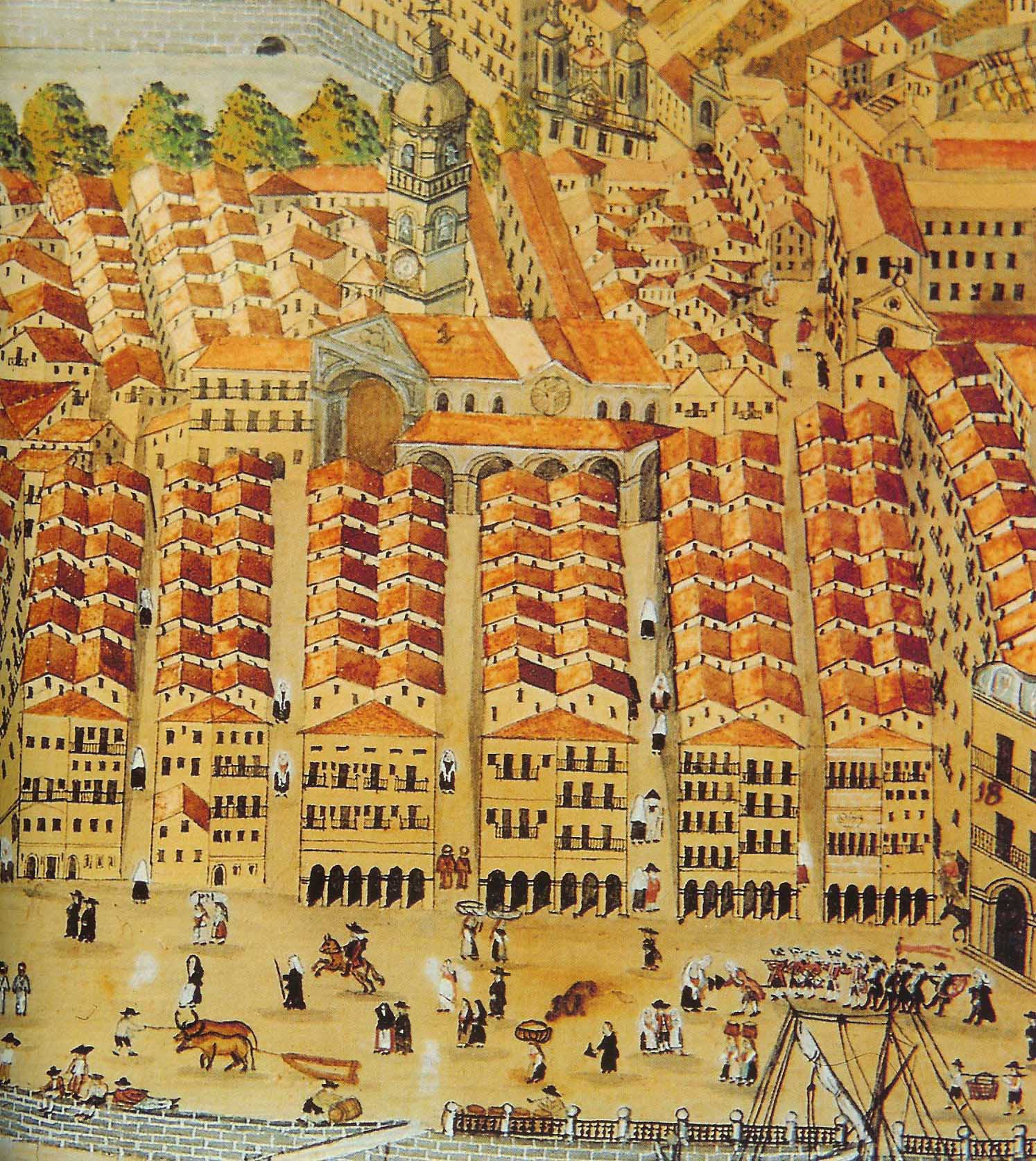 Bilboko irudia XVIII. mendean, orain Erriberako Merkatua dagoen lekuan zegoen Plaza irudikatuz, zazpi kaleetako batzuekin batera.